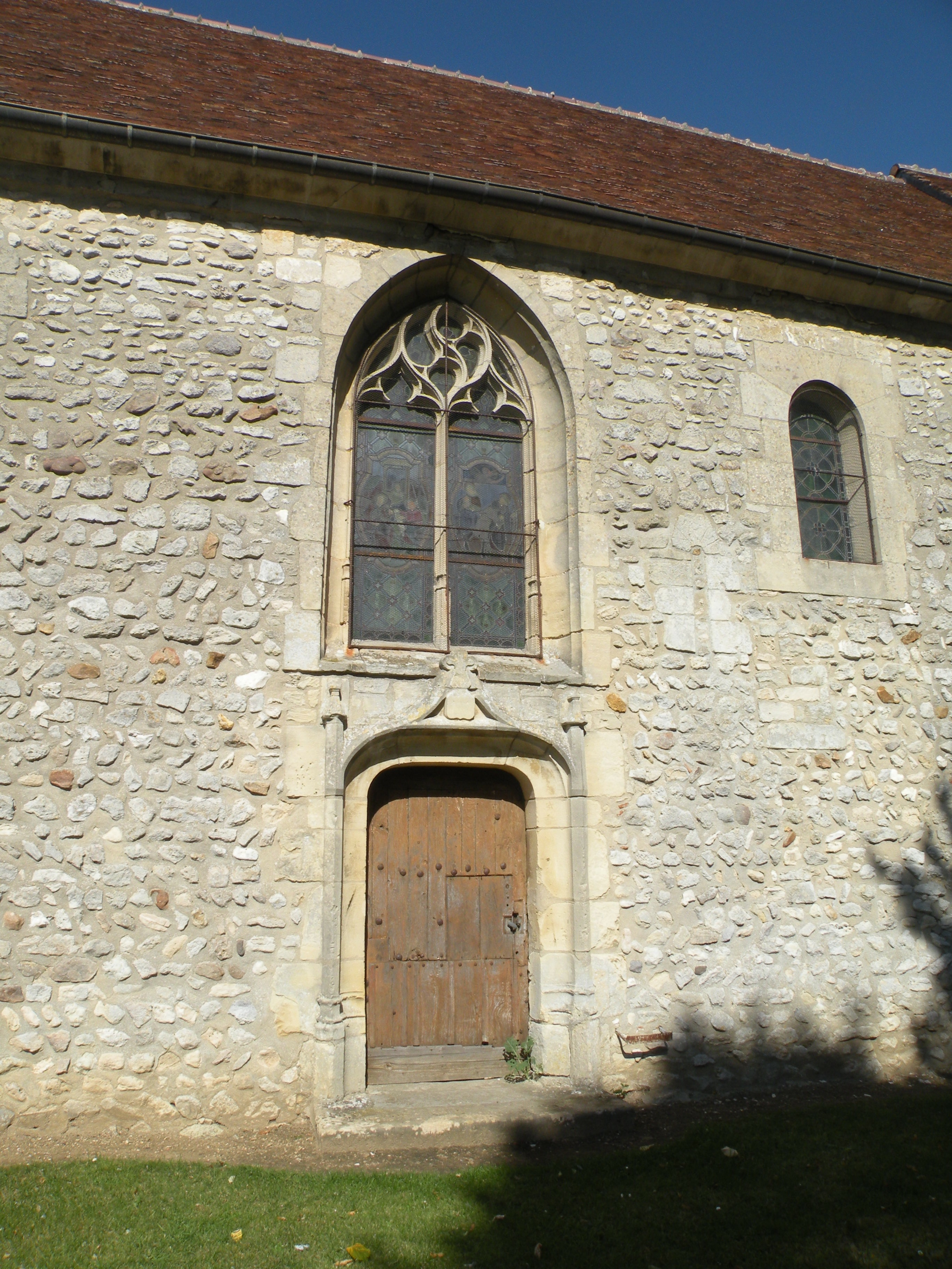 Église Saint-Martin de Lierville